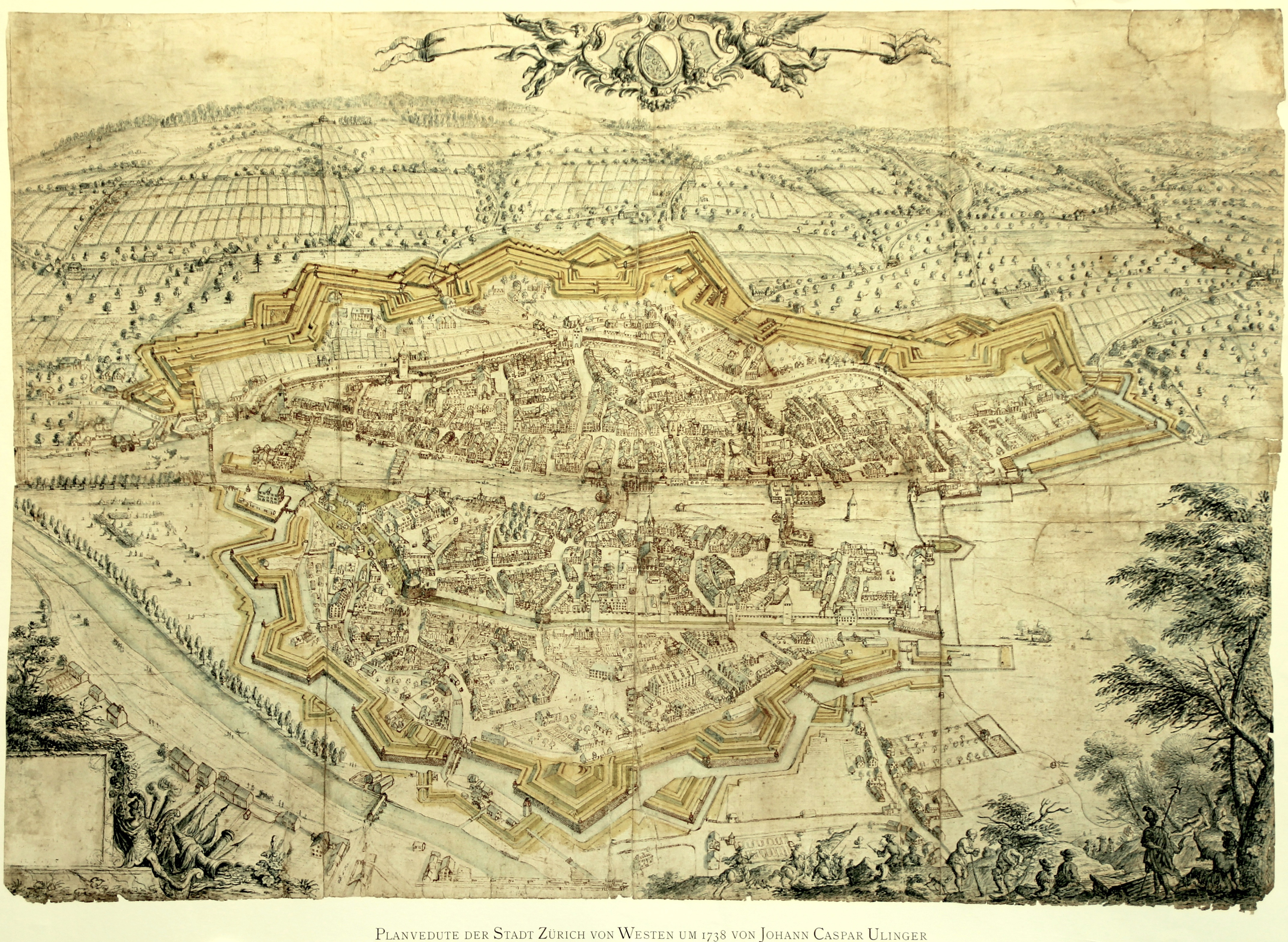 Johann Caspar Ulinger: Vedute Gesamtansicht